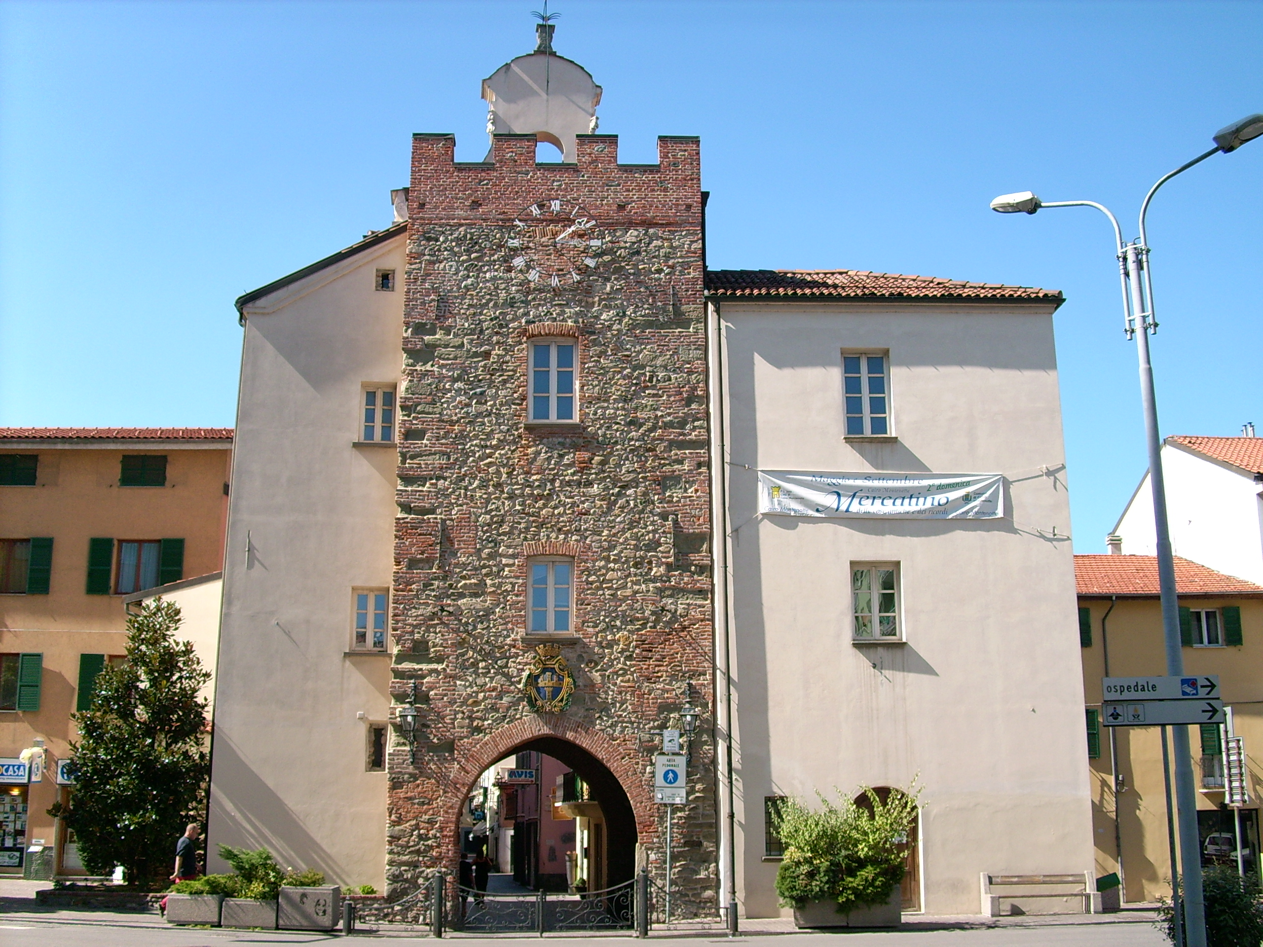 Cairo Montenotte, Liguria, Italia